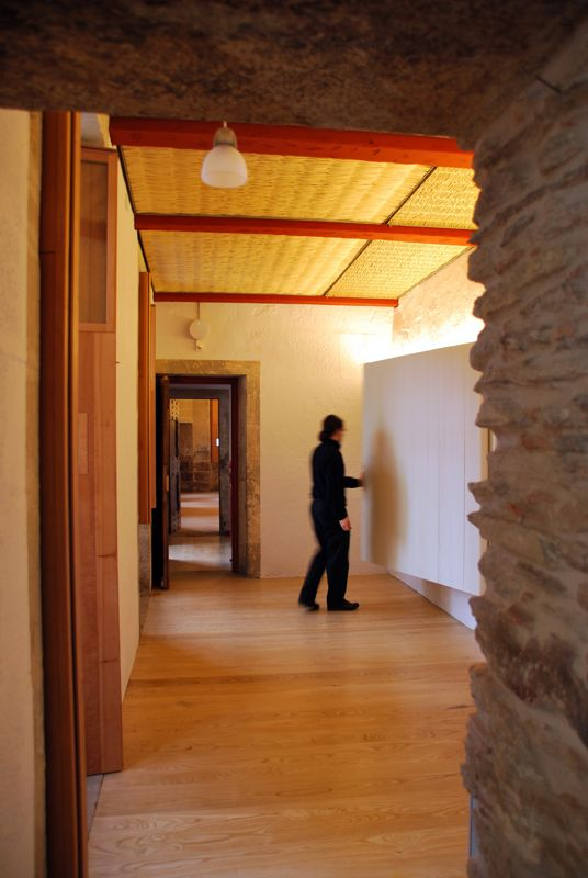 Interior de la Casa del Cabildo después de la intervención de restauración llevada a Cabo por el Consorcio de Santiago. Sala de exposiciones con mamparas abatibles.